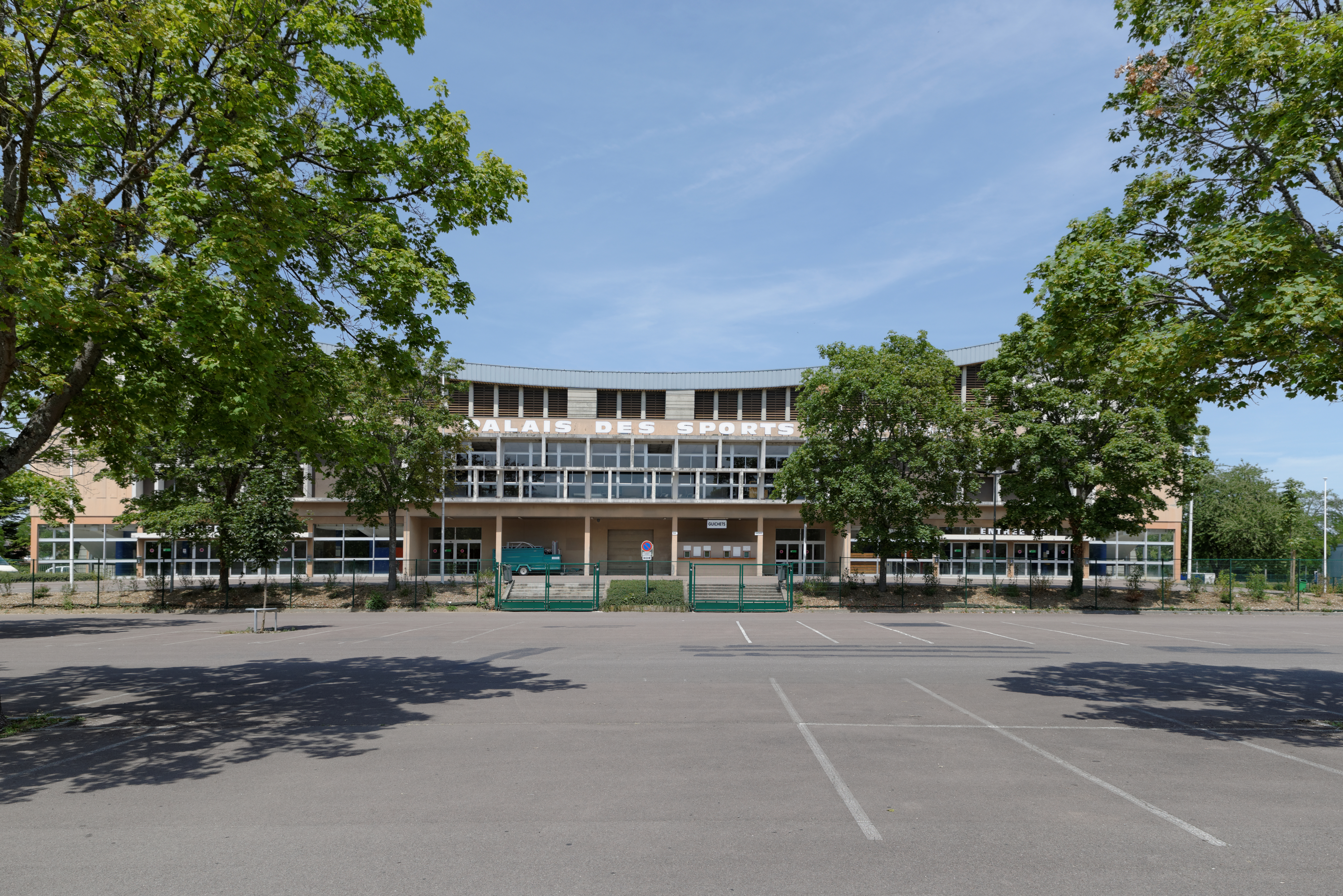 Palais des sports Jean-Michel Geoffroy de Dijon (Côte d'Or, Bourgogne, France) vu depuis le parking